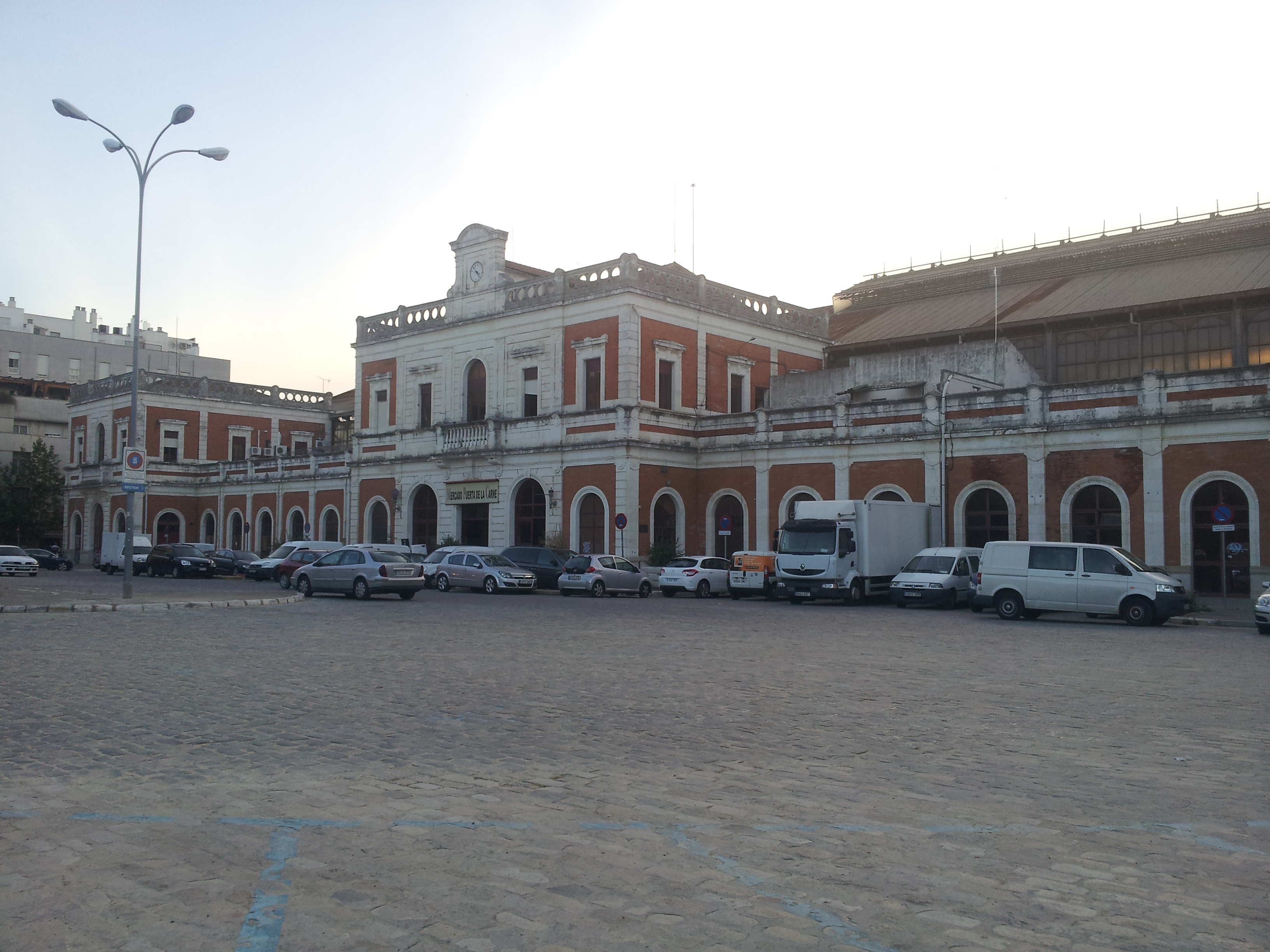 Antigua estación de Ferrocarril de San Bernardo, conocida popularmente como Estación de Cádiz